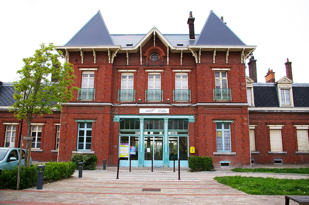 La présence d'une gare SNCF permet aux andrésiens de préparer sans stress leurs voyages ferroviaires.